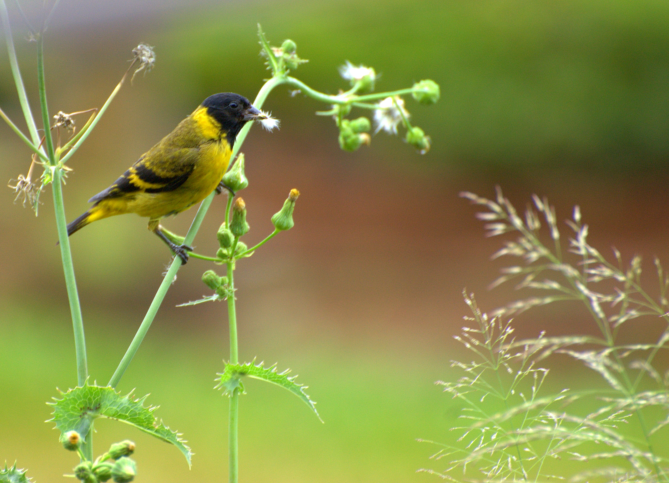 EPR - VIVEIRO DE MUDAS NATIVAS - Fazenda Vô-Vó - Piraju-SP .br